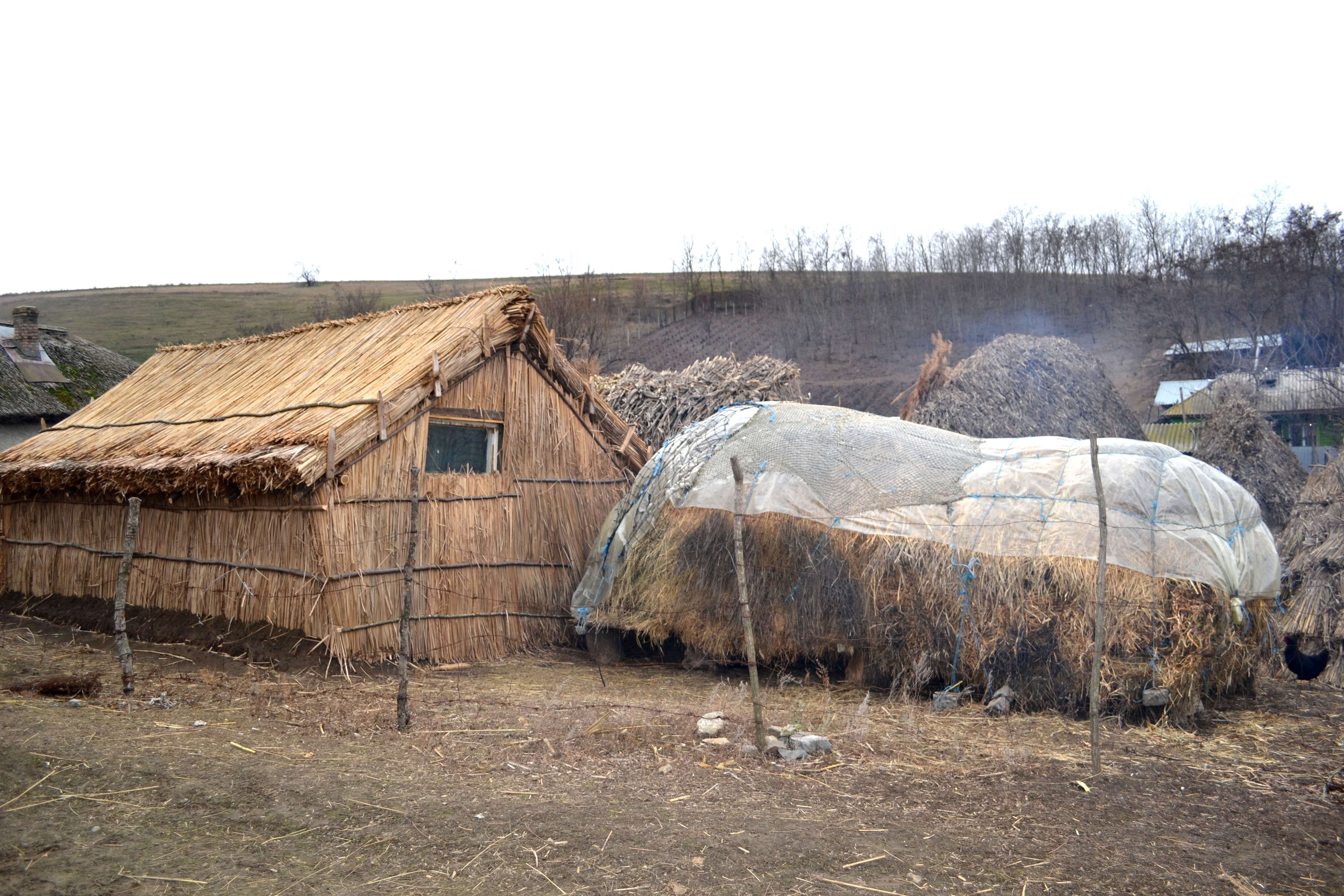 grajd traditional de stuf